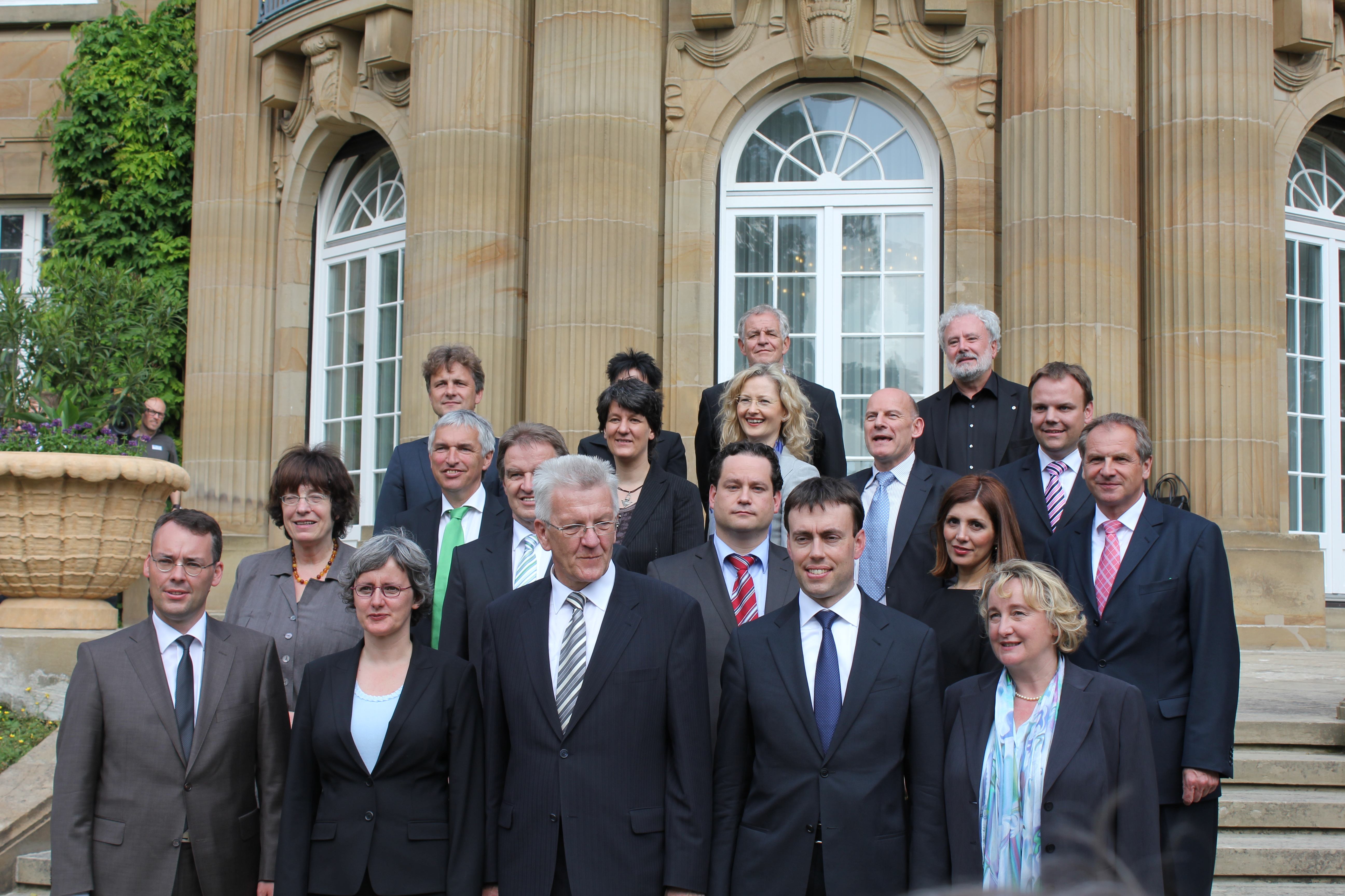 Kabinett Kretschmann